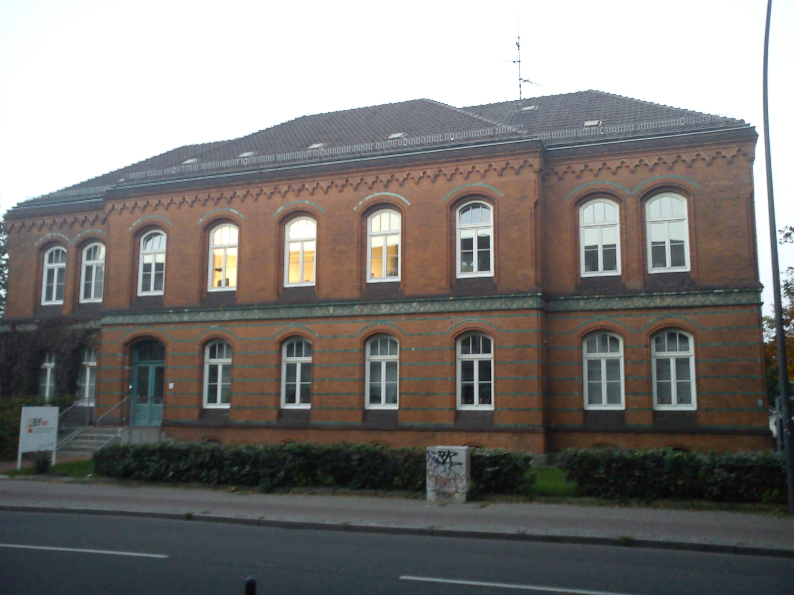 Verwaltungsgebäude alter Schlachthof Bremen, dann Wasserwirtschaftsamt